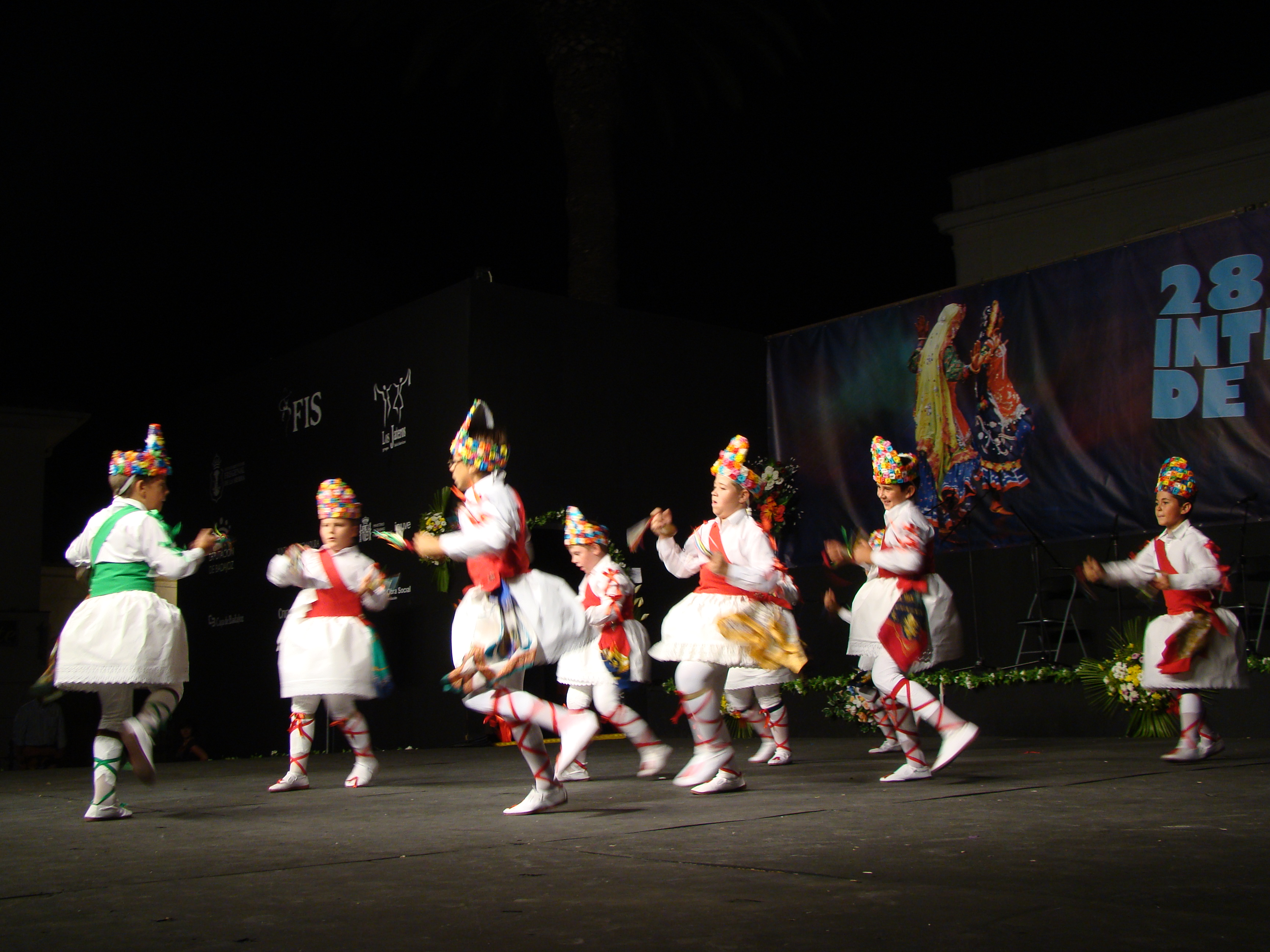 Danzaores